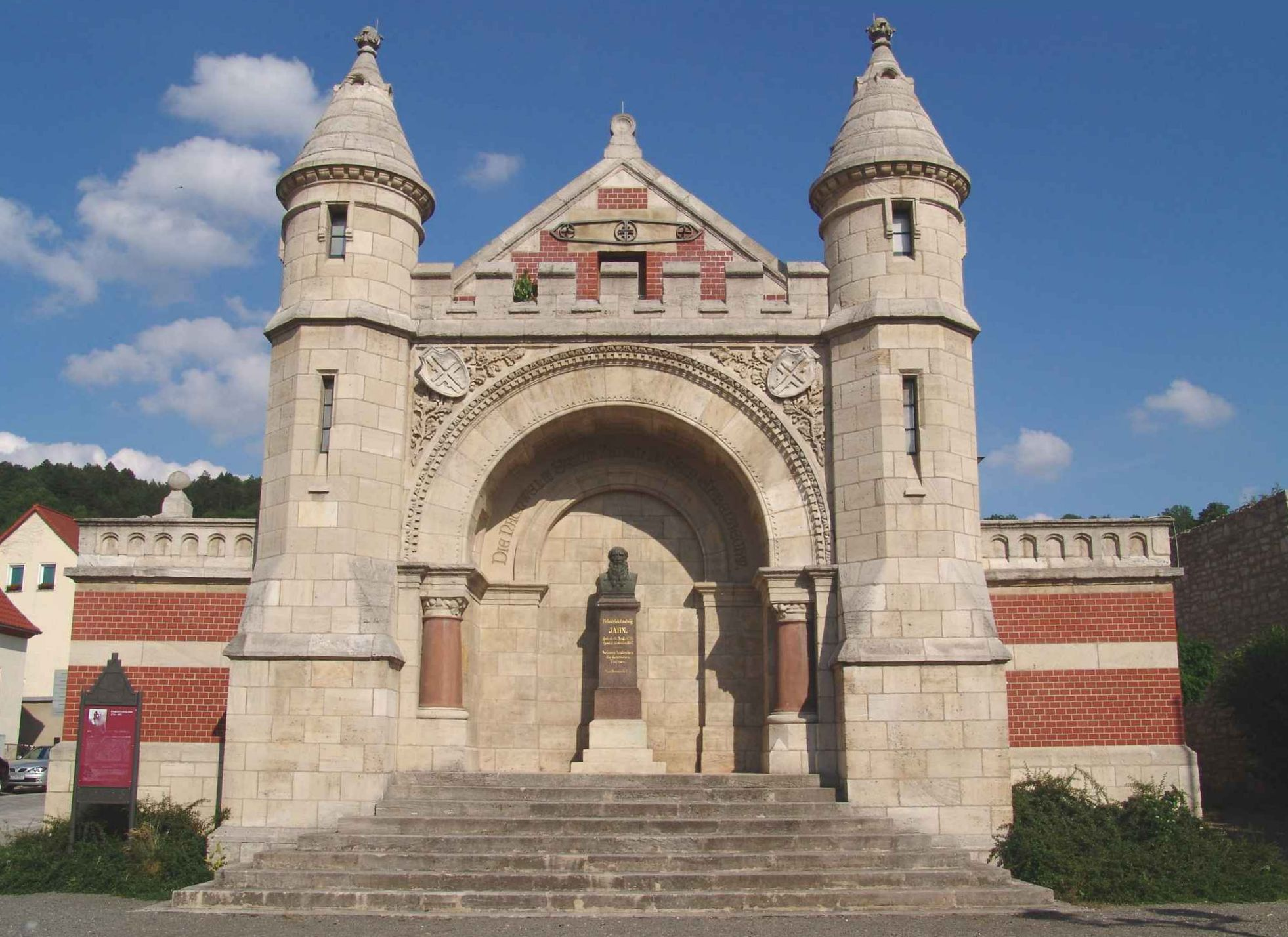 Grabmal von Friedrich Ludwig Jahn in Freyburg (Unstrut), mit Turnerkreuzen, Aufnahme 2005